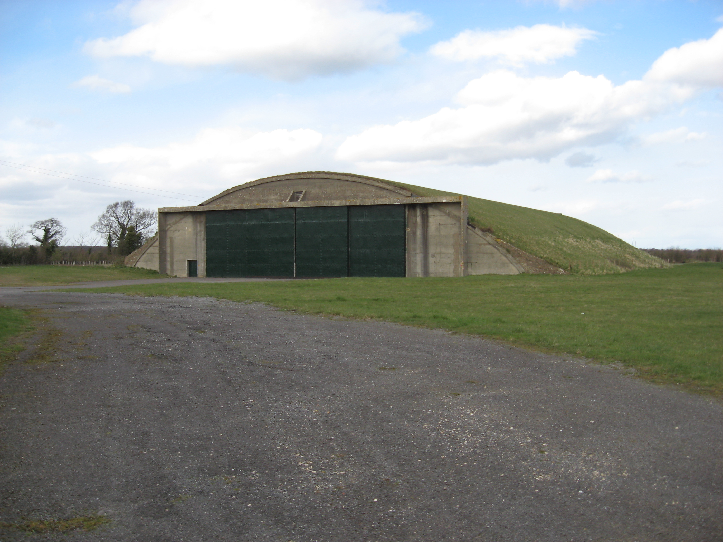 Former Aircraft Hanger, Hullavington.